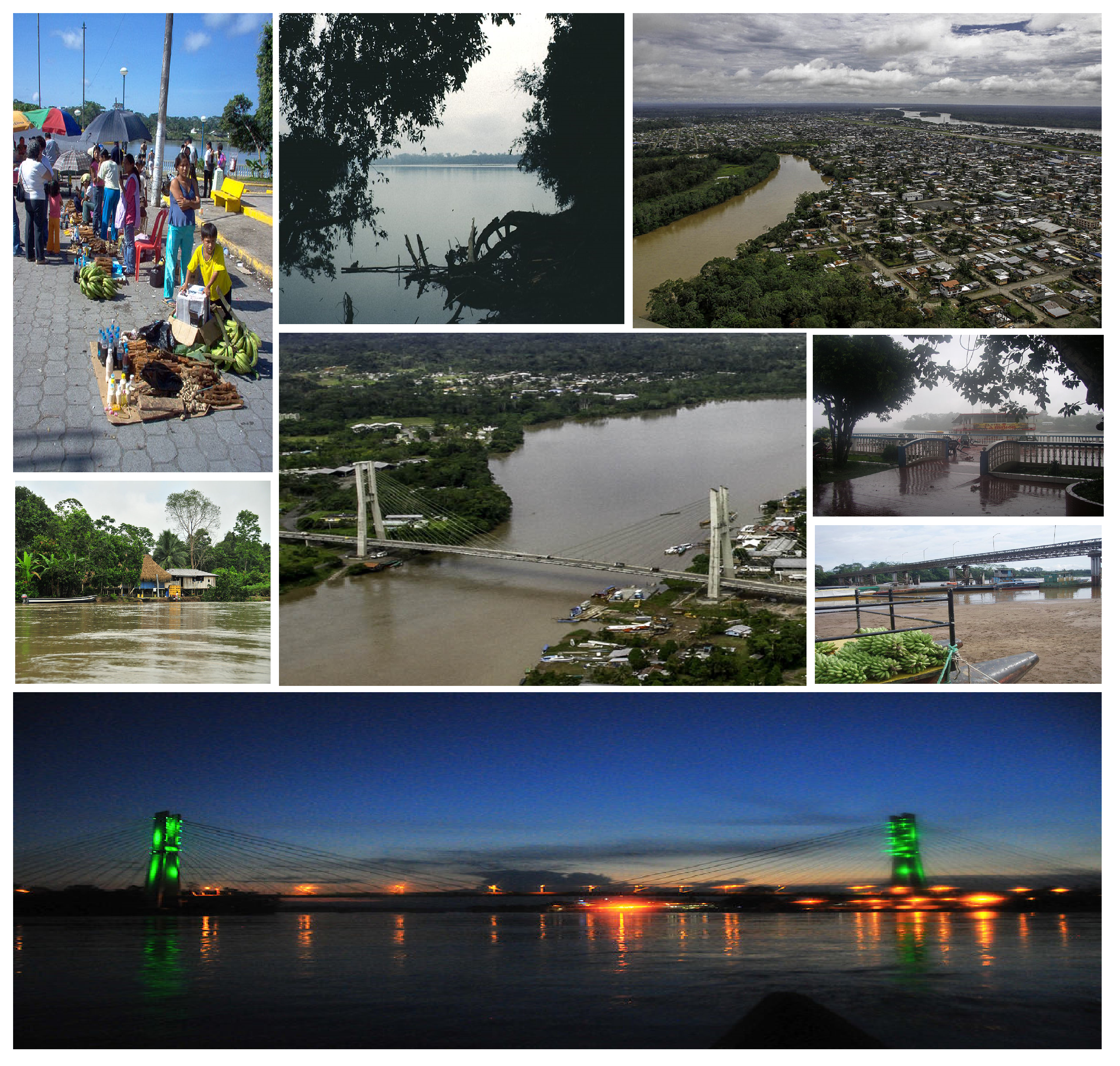 Montaje de El Coca (Puerto Francisco de Orellana) Ecuador